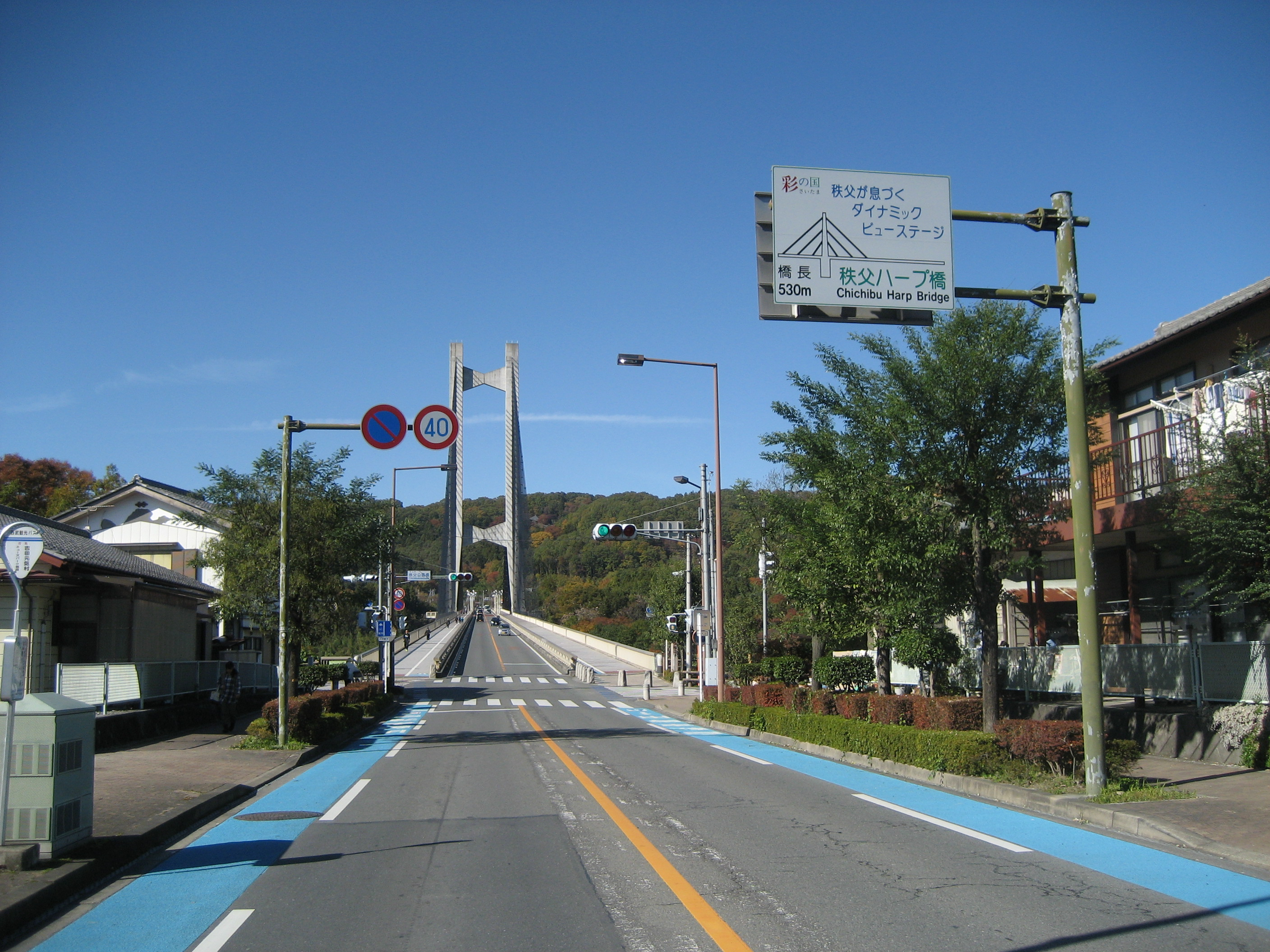 埼玉県道208号線秩父市秩父公園橋（秩父ハープ橋）付近